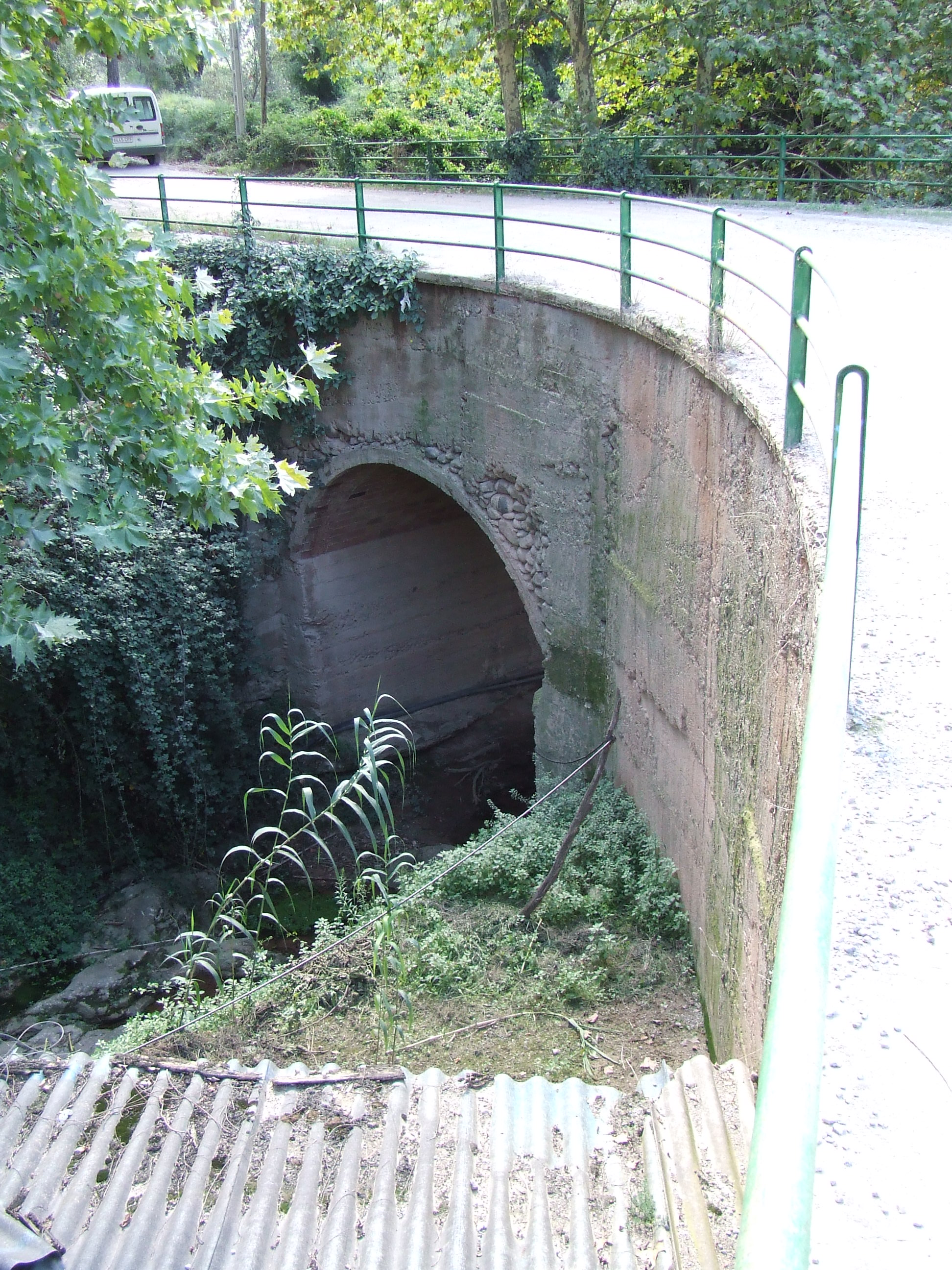 Pont del Mori (Riells del Fai, Bigues i Riells, Vallès Oriental).